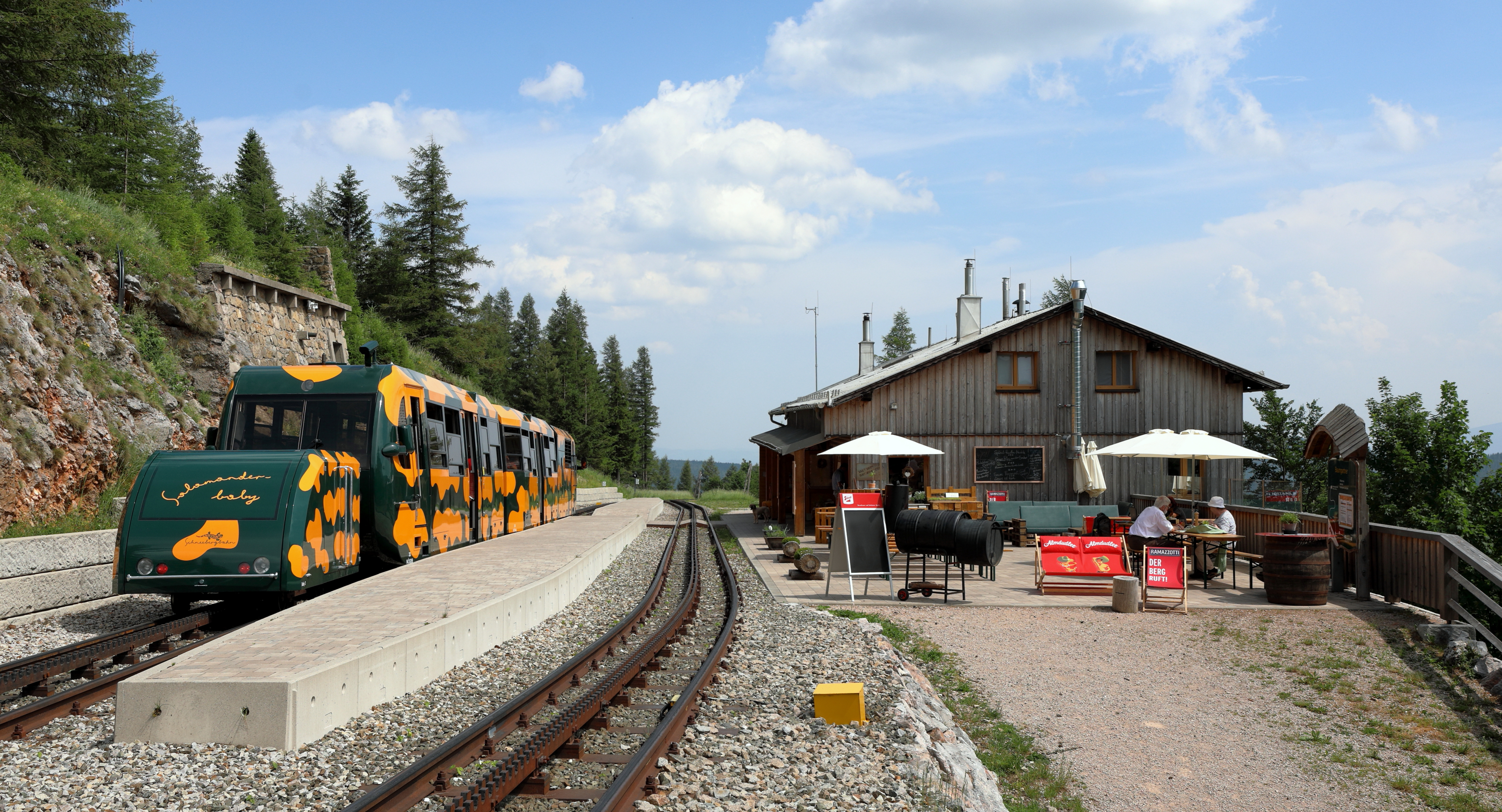 Nordwestansicht der Haltestelle Baumgartner der Schneeberg-Zahnradbahn in der niederösterreichischen Marktgemeinde Puchberg am Schneeberg und mit einem „Salamander“-Triebwagen in der Station.Die Haltestelle befindet sich auf 1396 Metern Höhe und 7,3 Kilometer von der Talstation entfernt. Die Haltestelle hat ihren Namen vom ehemaligen Baumgartnerhaus. Die Triebwagen mit dem „Salamander“-Design wurden ab 1999 in Betrieb genommen. Eine Garnitur, bestehend aus Steuerwagen, Zwischenwagen und Triebkopf mit 544 kW Leistung, ist 30,41 m lang, 41,25 Tonnen schwer und bis zu 15 km/h schnell. Seit 2006 gehört zu einer Garnitur auch fallweise ein Güterbeiwagen, der „Babysalamander“ genannt wird.